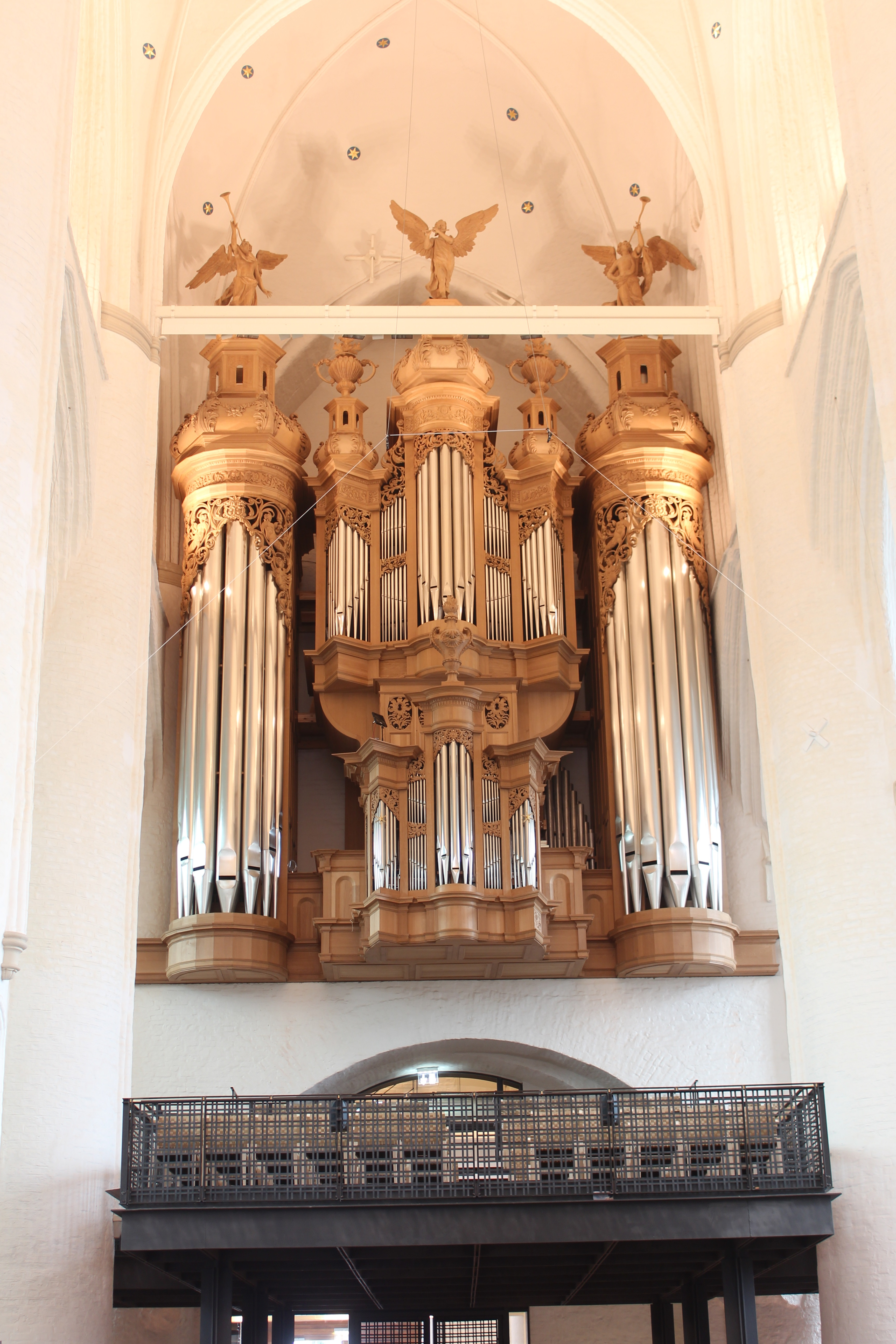 Hauptorgel von St. Katharinen, Hamburg, Deutschland